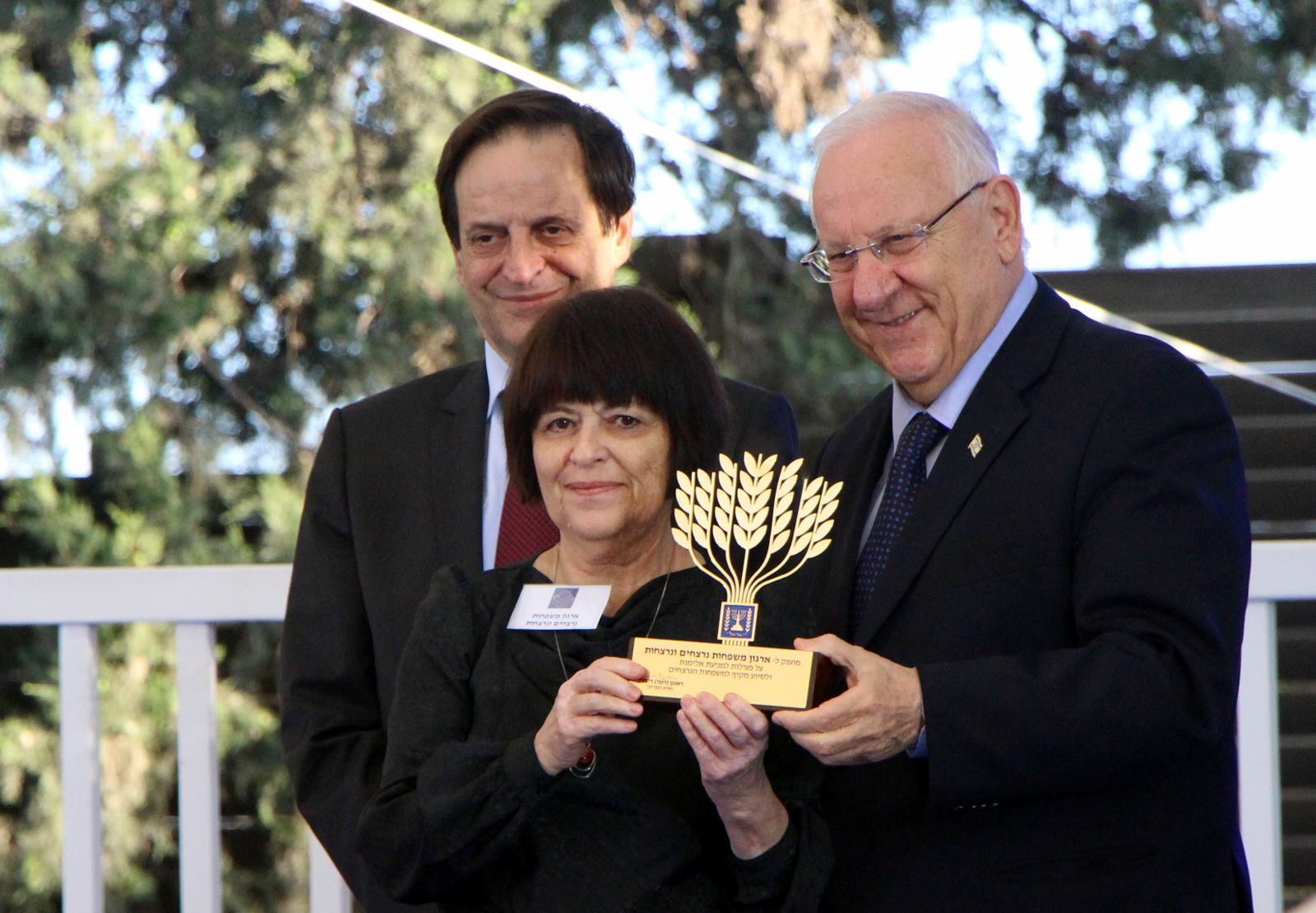 אות הנשיא למתנדב לשנת תשע״ה מוענק לארגון משפחות נרצחים ונרצחות (נשיא המדינה - ראובן ריבלין, יו"ר ארגון משפחות נרצחים ונרצחות – לרה צינמן, , יו"ר הוועדה המייעצת ל"אות הנשיא למתנדב" - דן מרידור)